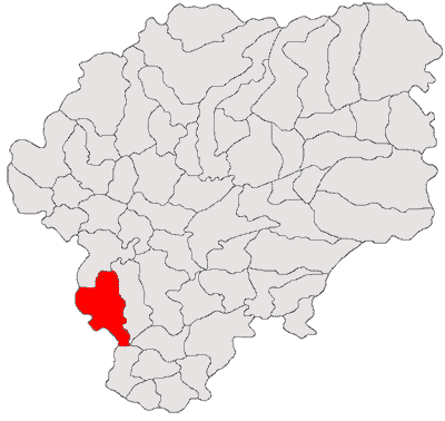 Categorie:Hărţi ale judeţului Bistriţa-Năsăud